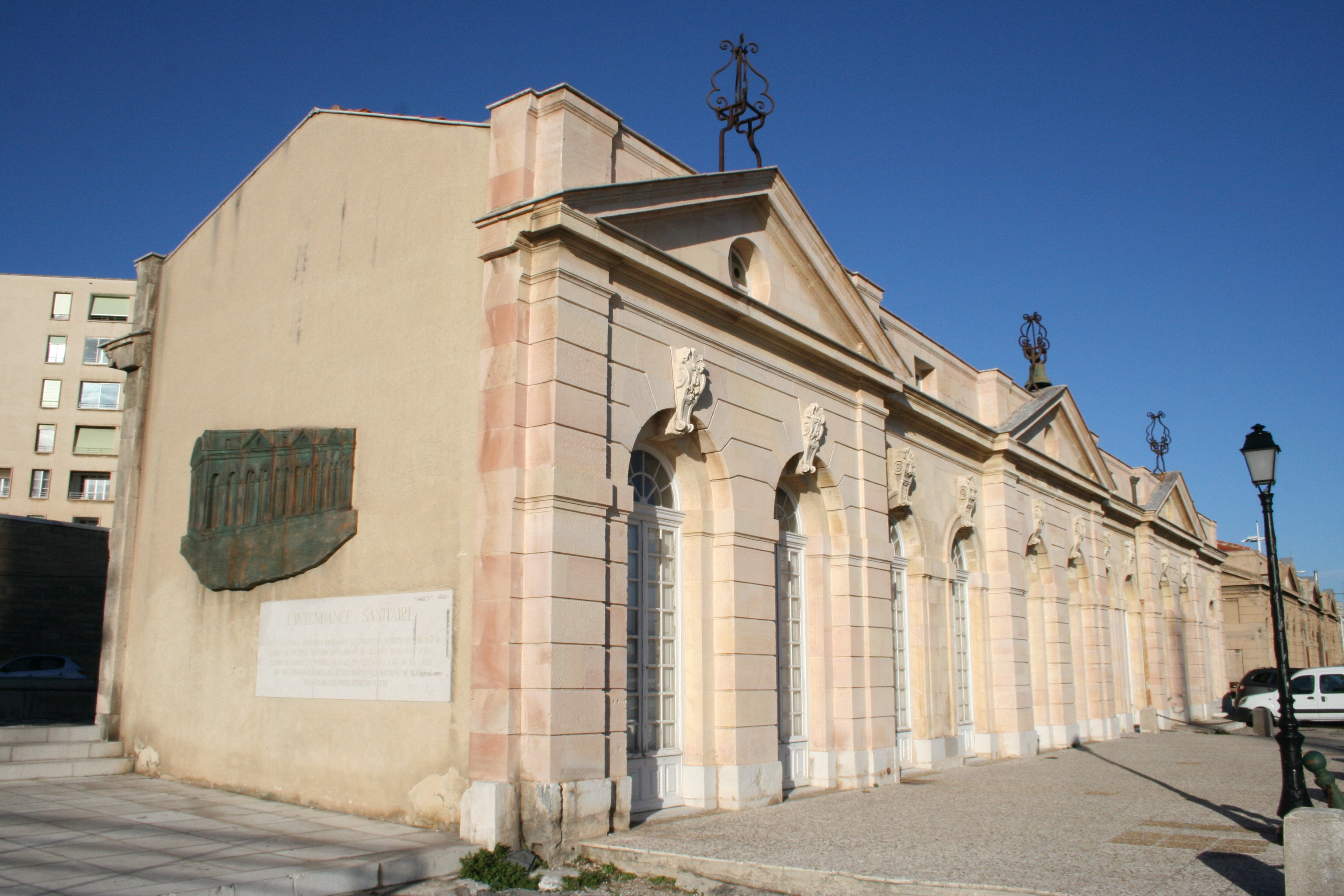 Bureau de santé de Marseille situé près du fort Saint-Jean et construit en 1719. .